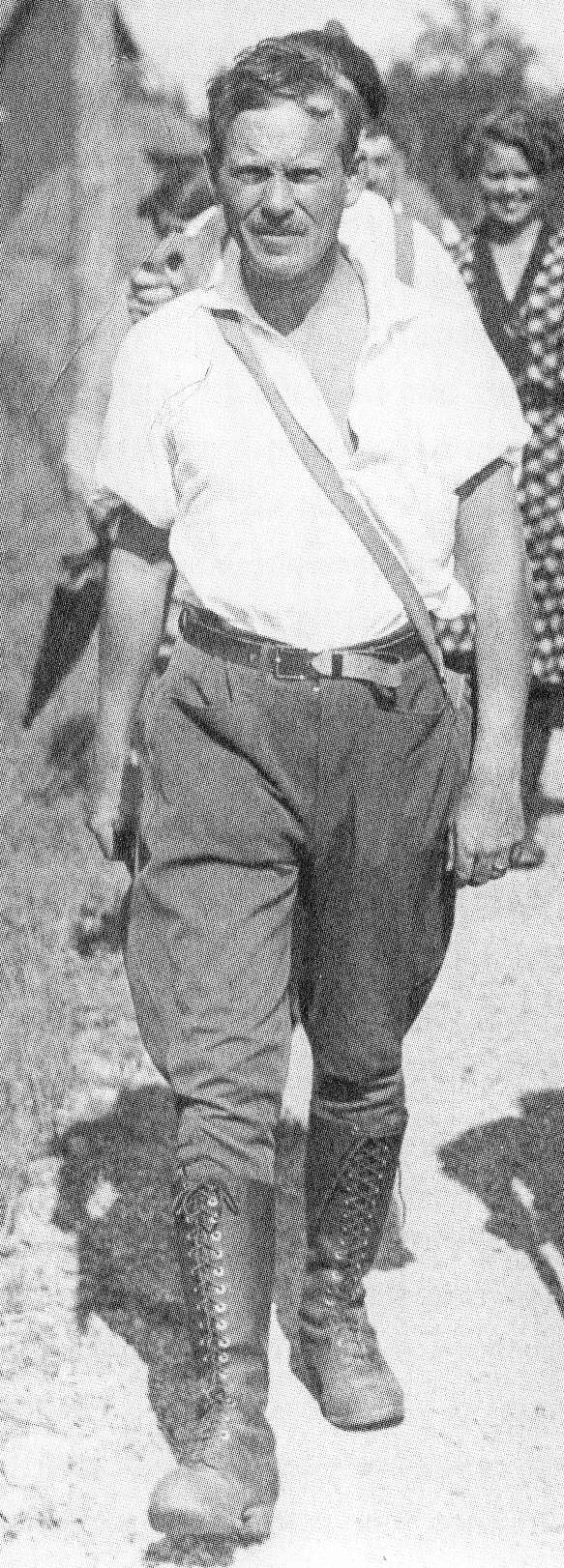 Swedish biologist Einar du Rietz (1895-1967)